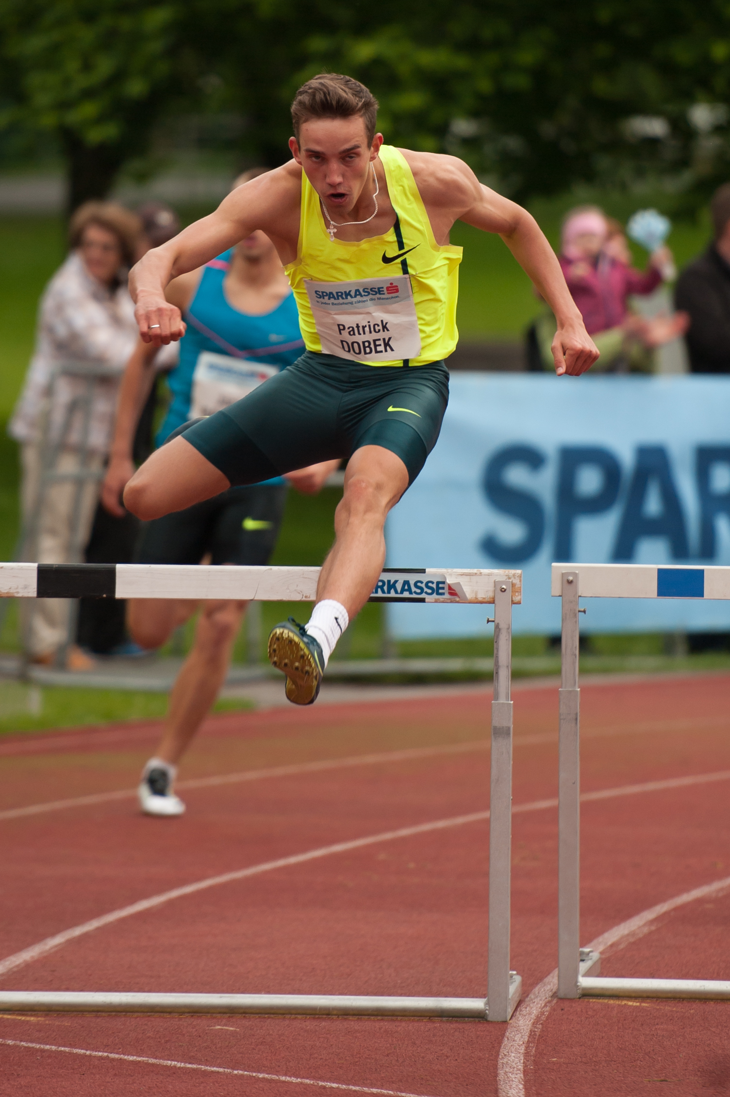 Salzburger Leichtathletik Gala am 27. Mai 2015: Patrick Dobek